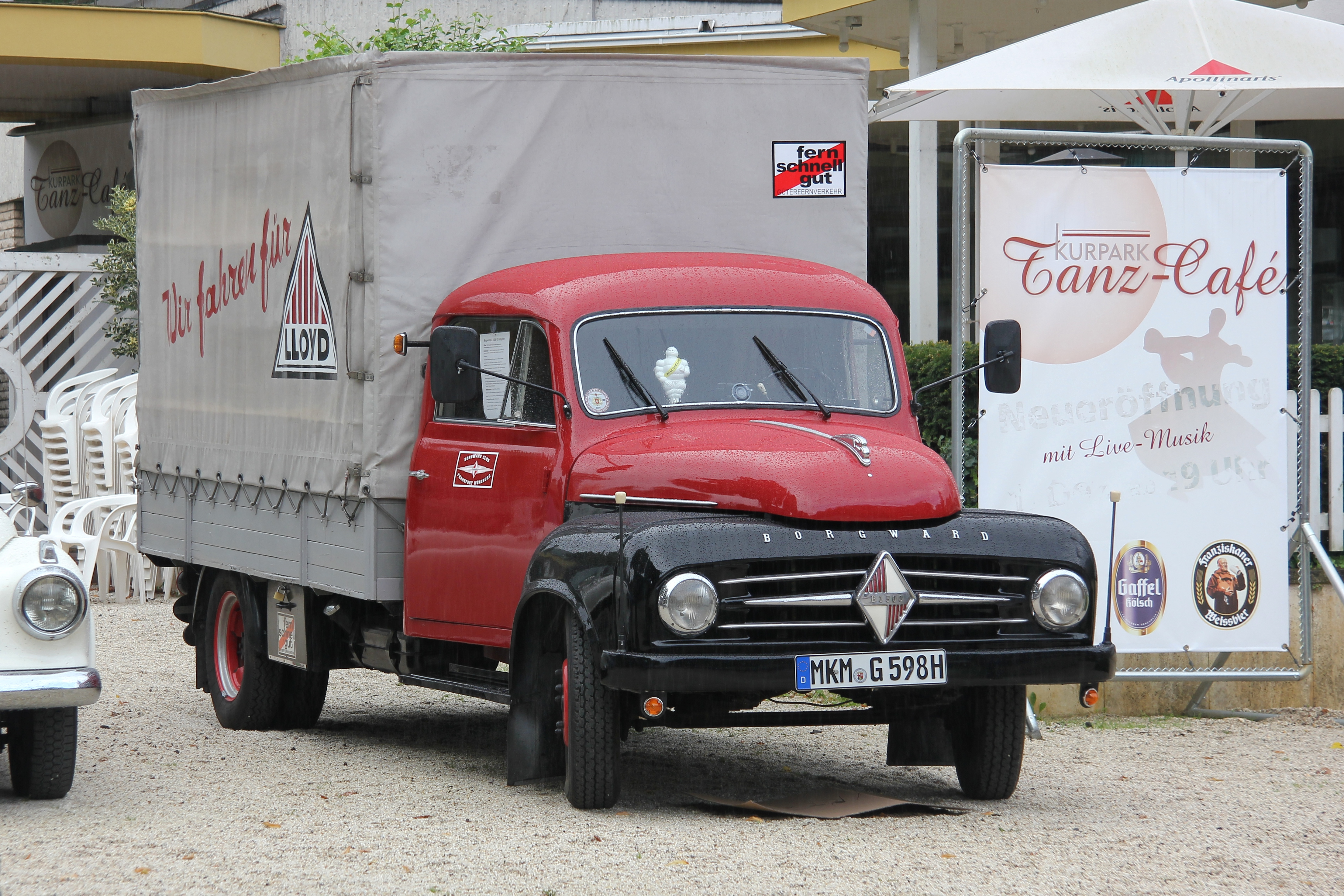 Borgward B 1500 II, Bauzeit 1954 bis 1960 (Kennzeichen des Fahrzeugs verändert).Geschichte des abgebildeten Fahrzeugs:1957 an Stadt Ratzeburg als Abschleppwagen mit 1,8-l-Dieselmotor, 42 PS, ausgeliefert, 1967 als Abschleppwagen an Autohändler verkauft,später von einem Lloyd-Freund originalgetreu zum Lkw umgebaut,2010 vom jetzigen Eigentümer gekauft und restauriert; 60-PS-Motor der Borgward Isabella